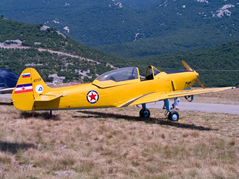 Aeromiting na Grobniku